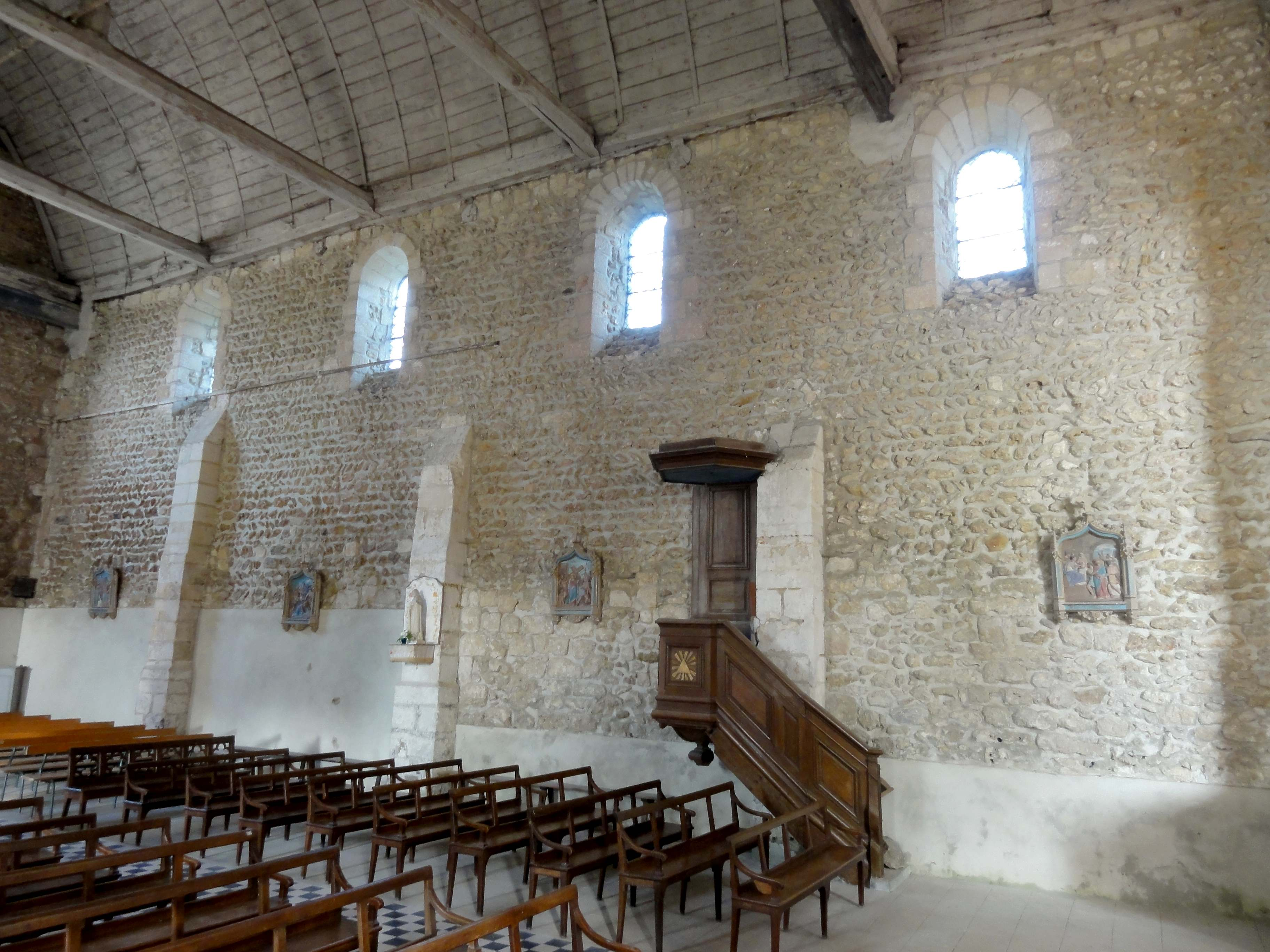 Intérieur de l'église - voir titre.